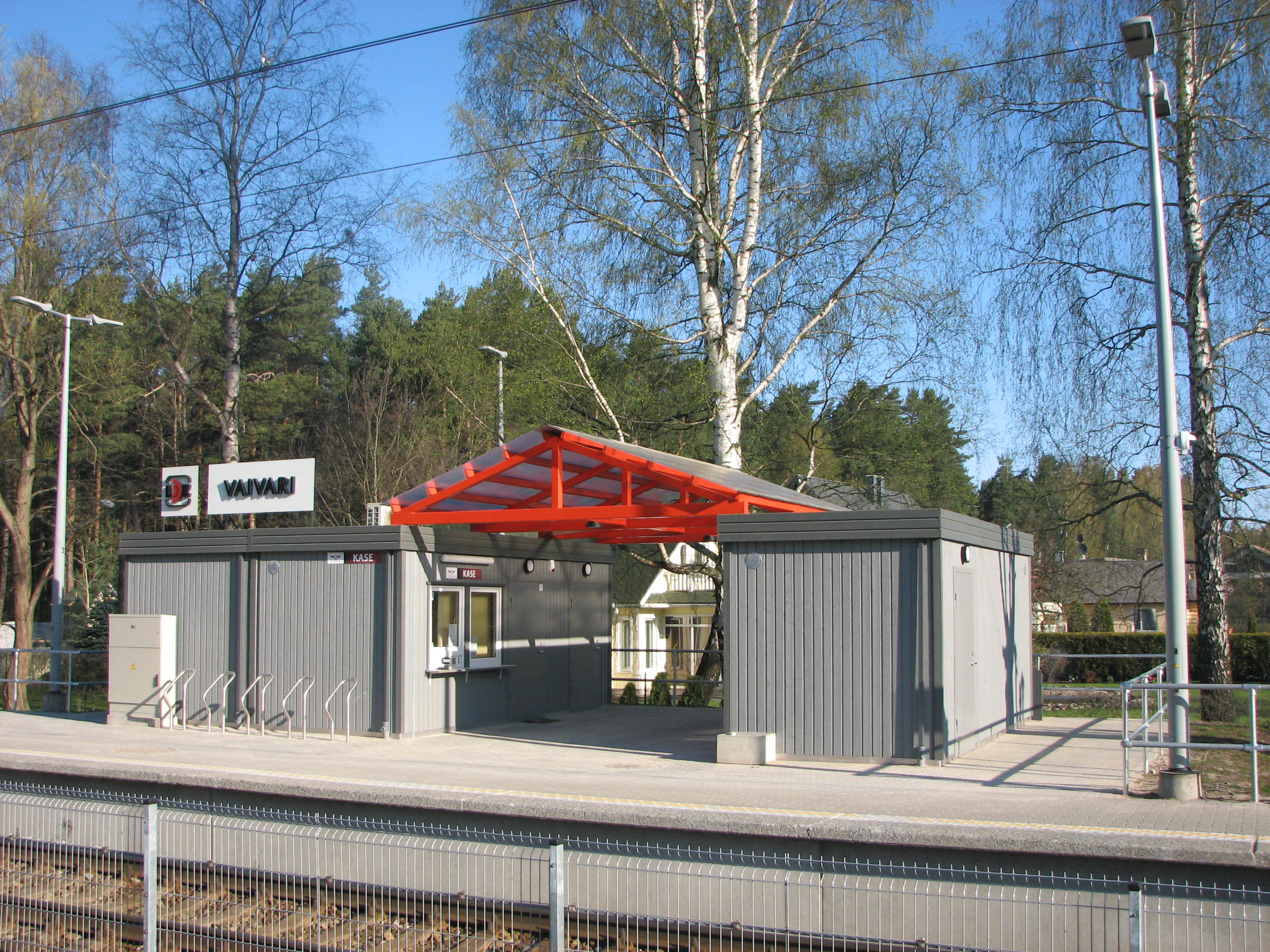 Vaivari railway station. Jurmala, Latvia. Пассажирский павильон остановочного пункта Вайвари, Юрмала, Латвия.